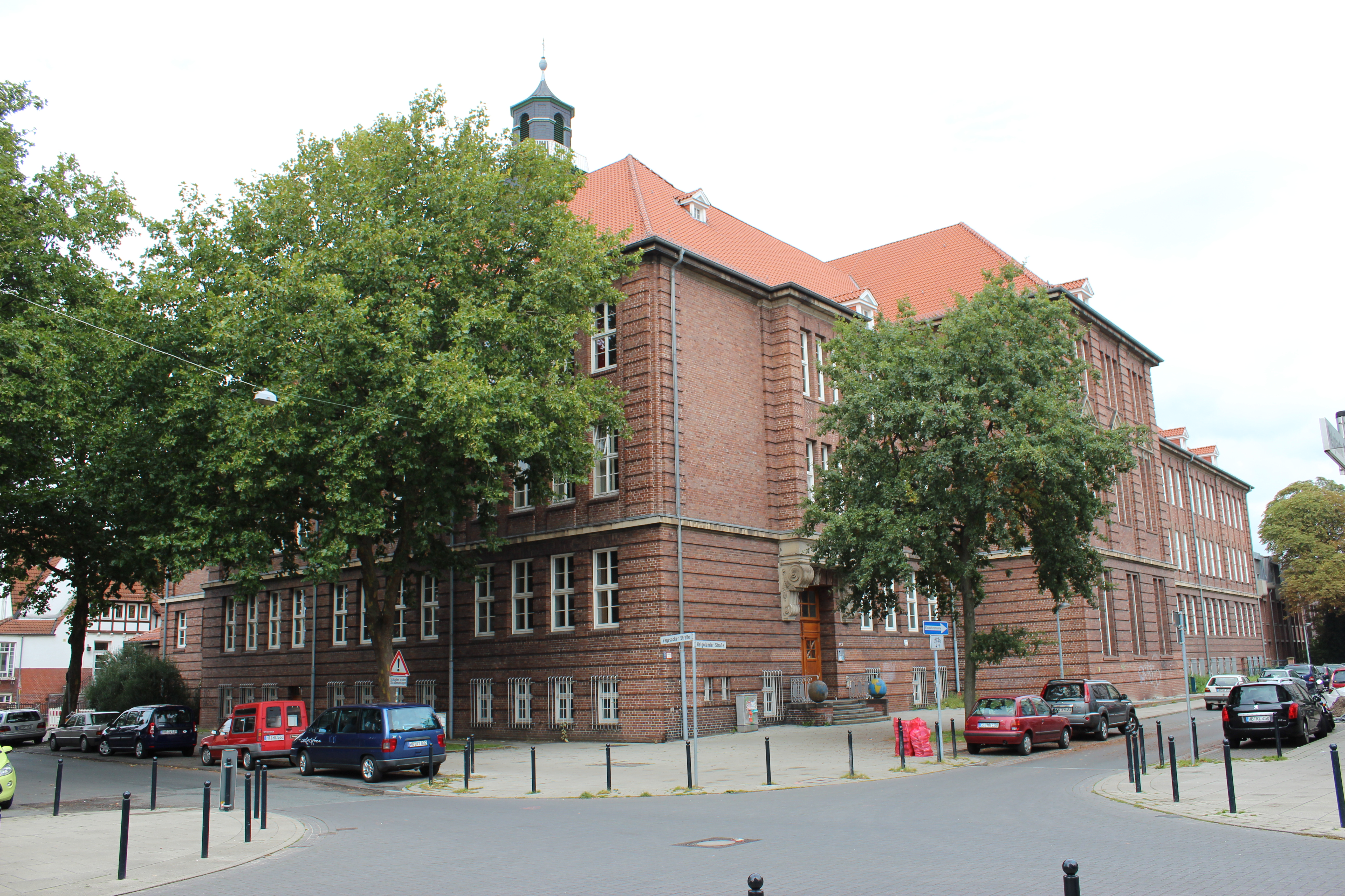 Volksschule, Doppelschule, Versuchsschule, Schulzentrum an der Helgolander Straße in Bremen, Helgolander Straße 67, 69 / Vegesacker Straße 109.Das abgebildete Objekt ist ein geschütztes Kulturdenkmal in der Freien Hansestadt Bremen, mit der Nr. 0484 beim Landesamt für Denkmalpflege registriert.